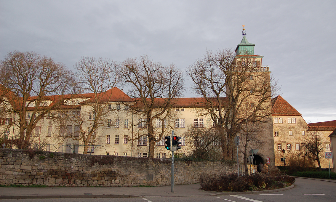 Reste von Schloss Grüningen, das heutige Helene-Lange-Gymnasium, mit Oberem Tor (von Westen)